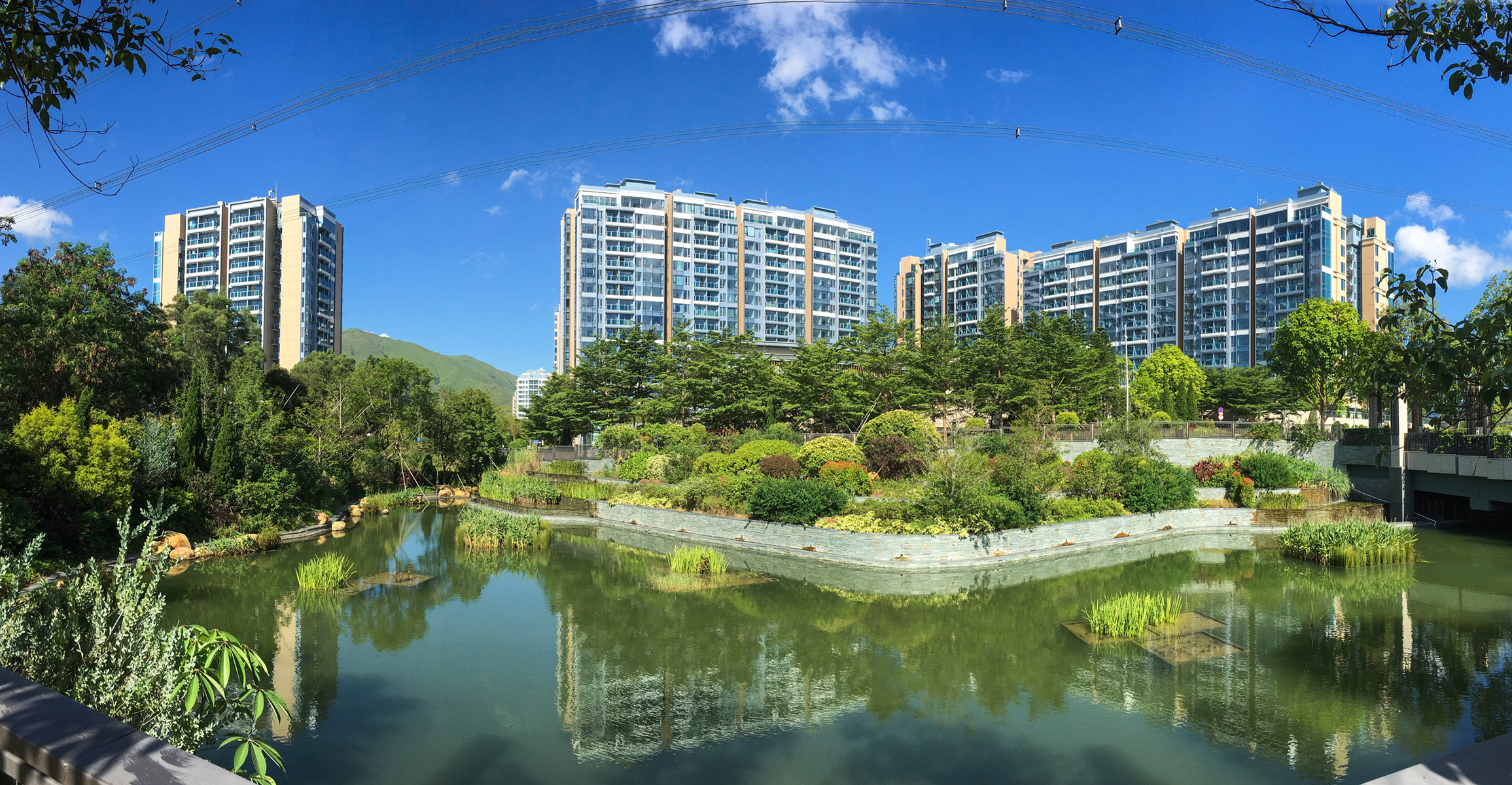 Park YOHO overview